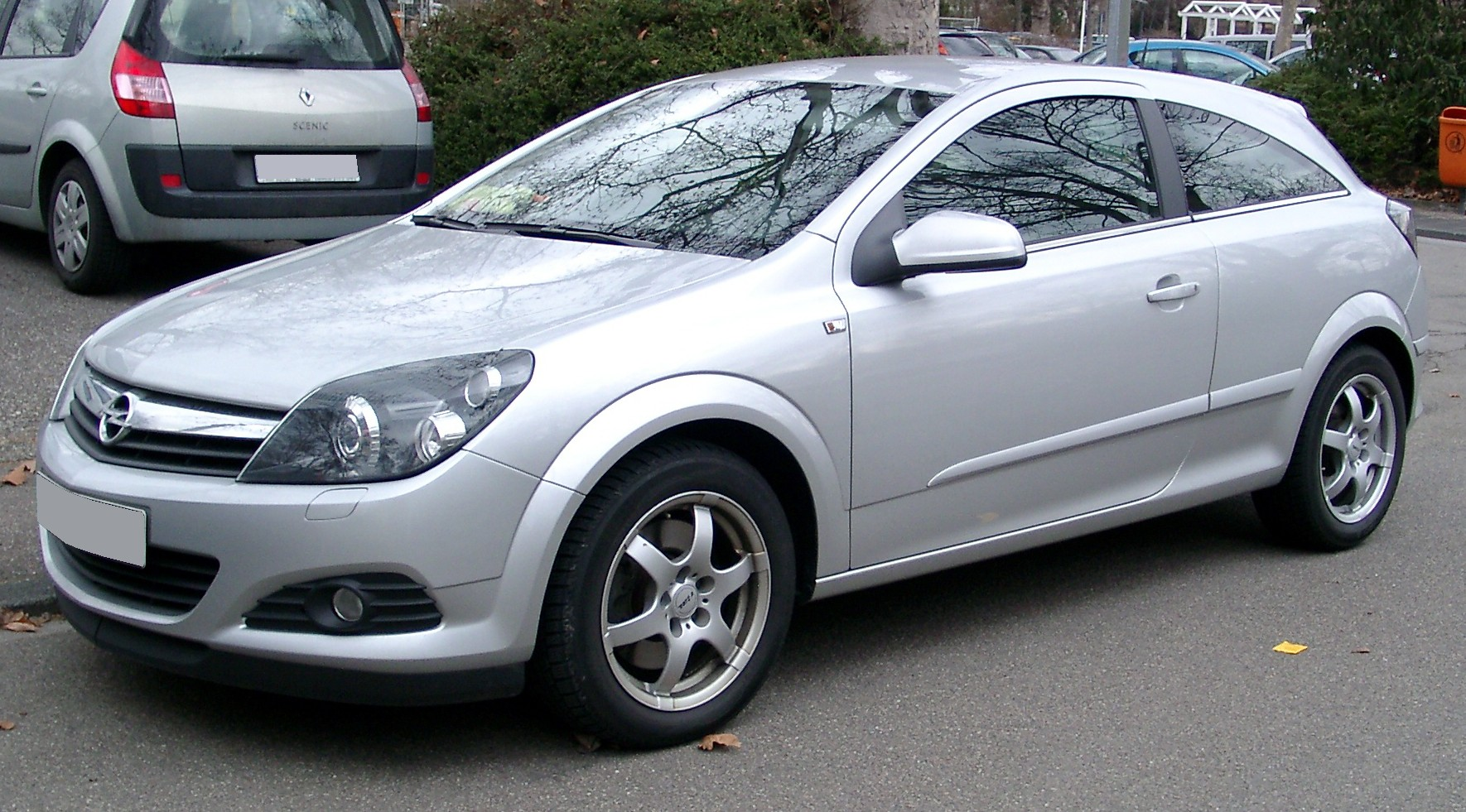 Opel Astra H GTC